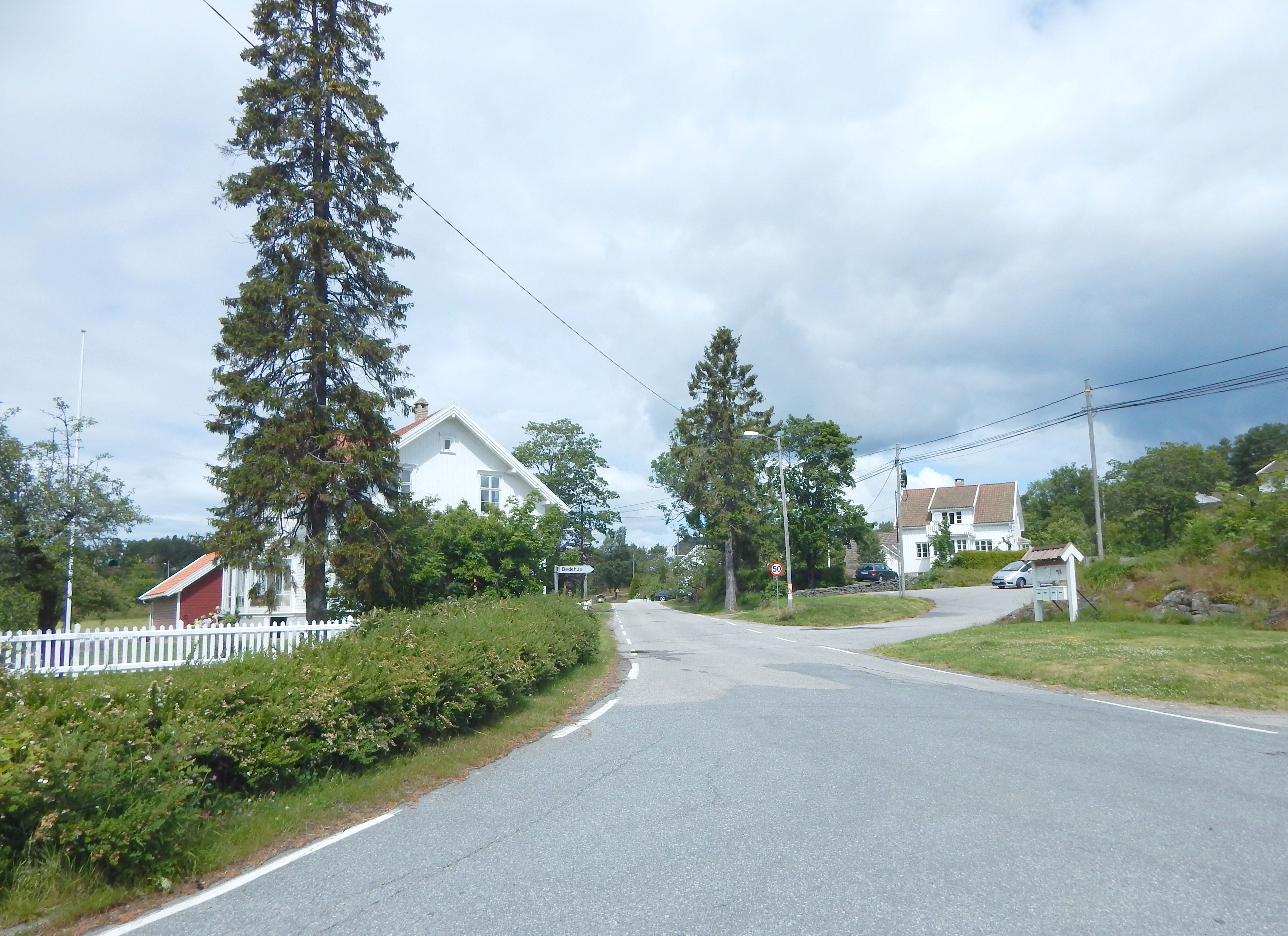 Fylkesvei 226 ved Høvåg